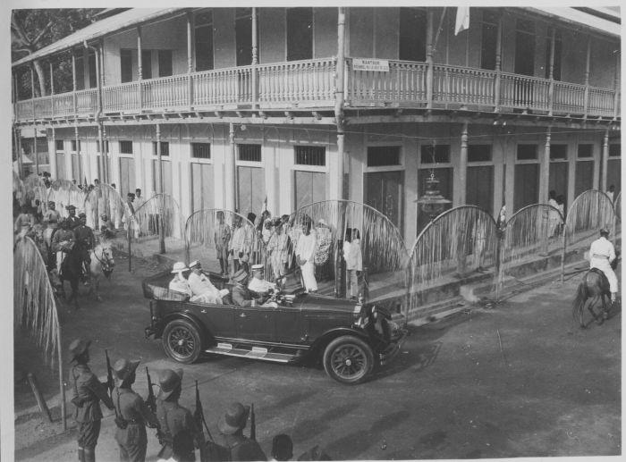 Foto. Gouverneur-Generaal De Graeff wordt rondgereden door de straten van Gorontalo tijdens een bezoek aan Celebes